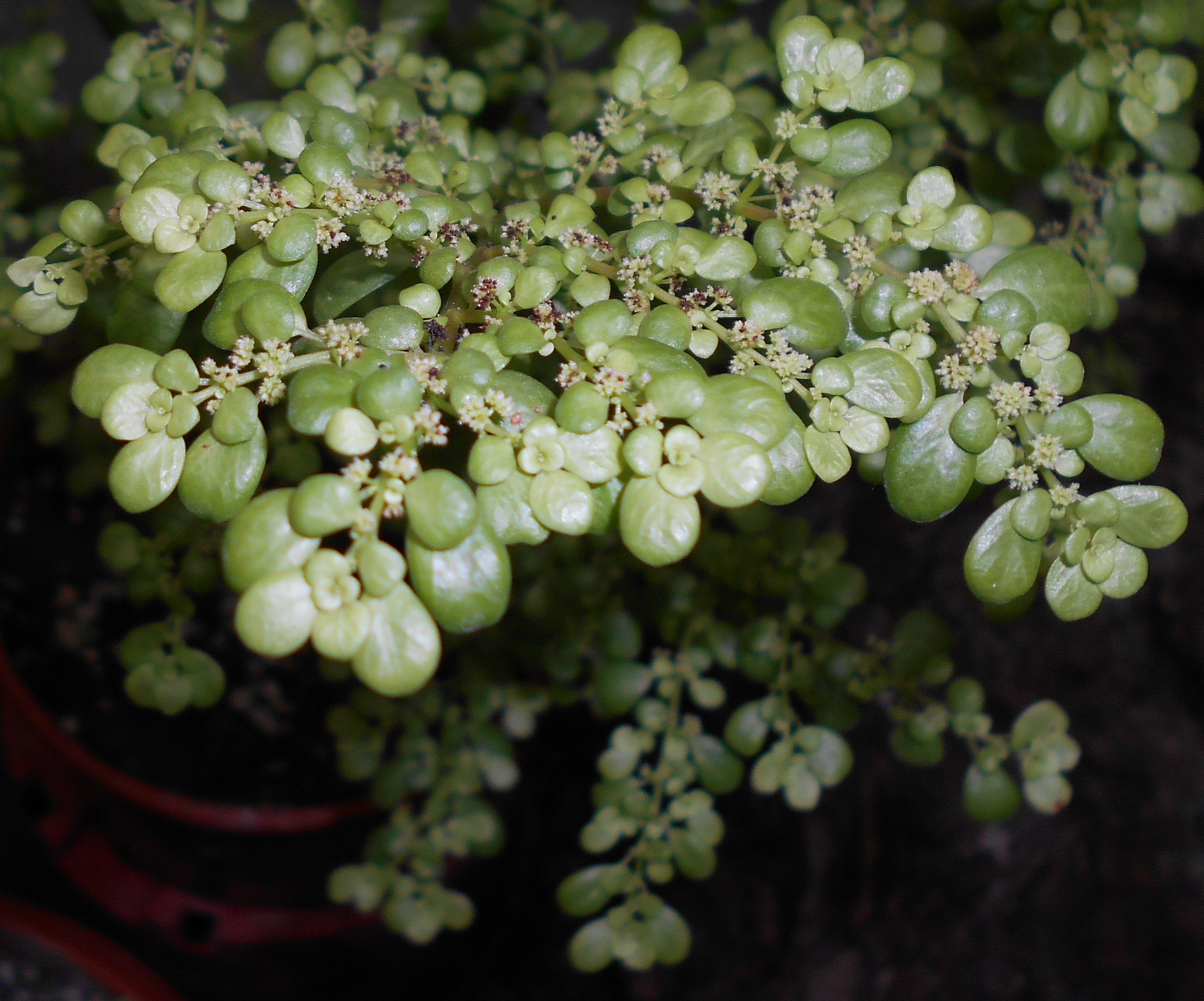 Pilea microphylla, Ogród Botaniczny UMCS w Lublinie.